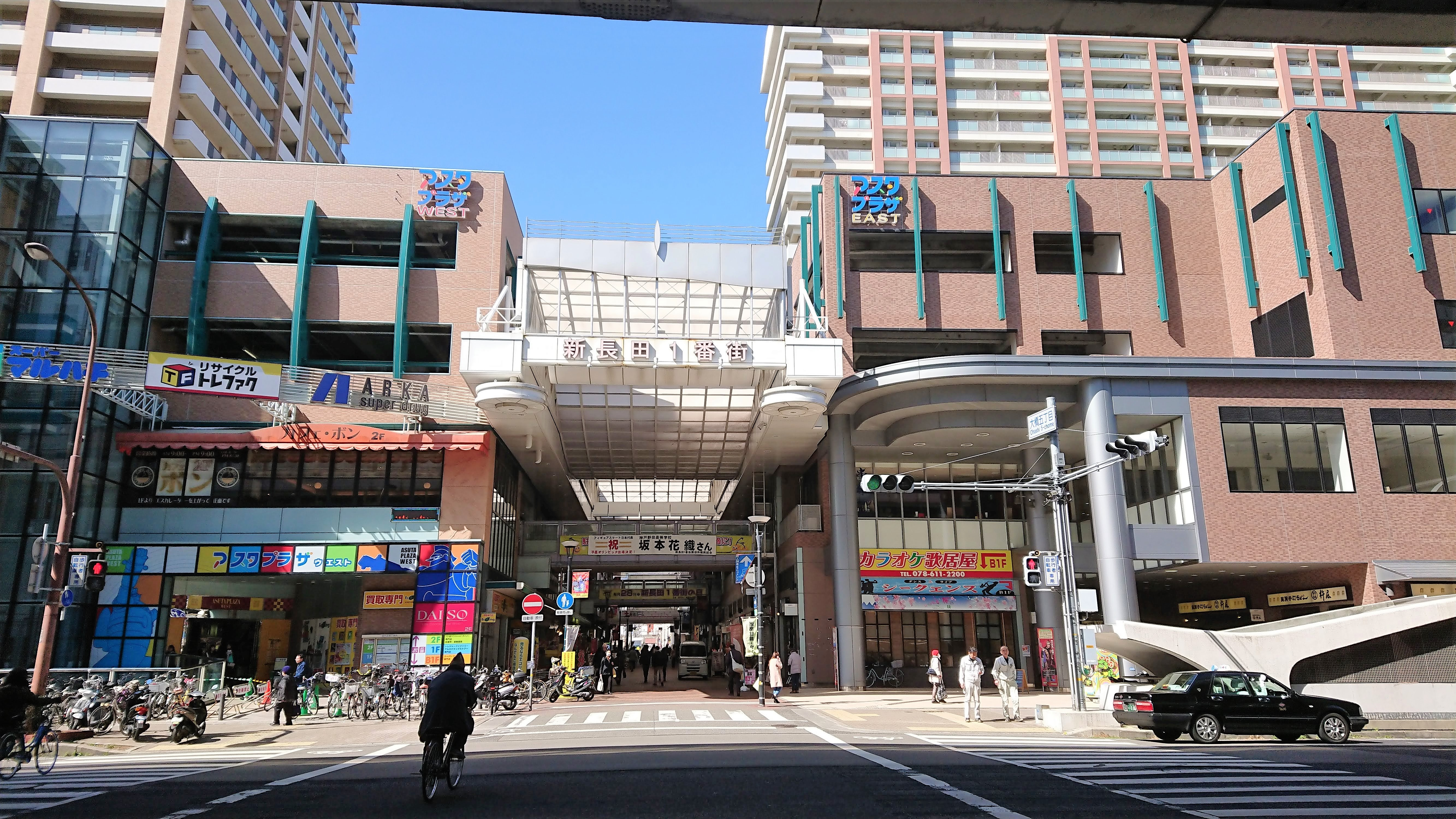 国道2号線より新長田1番街を北に望む